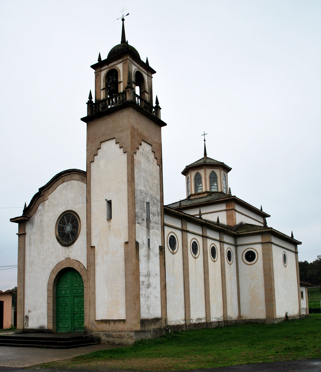 Igrexa de Seoane, Monforte de Lemos.